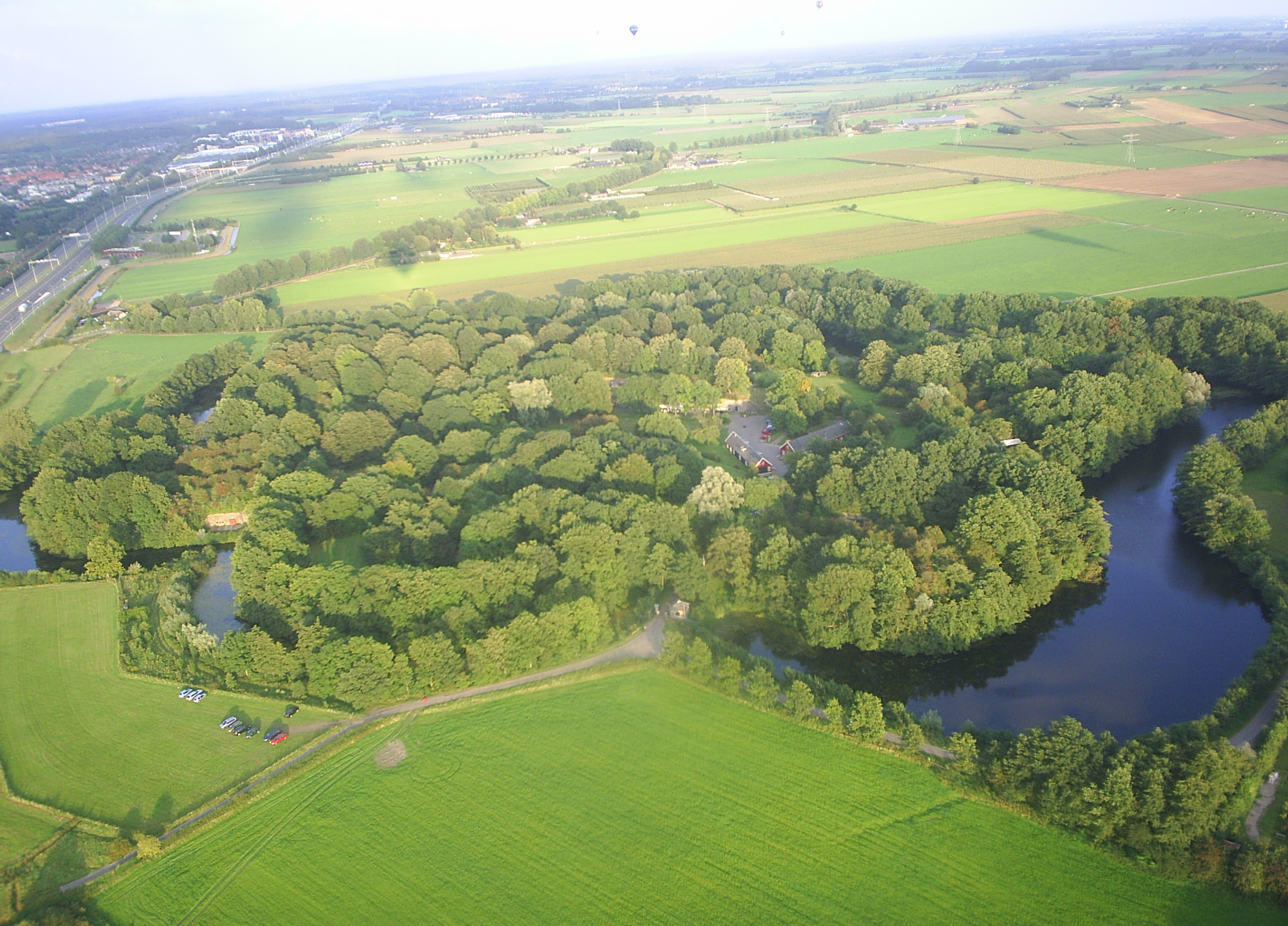 Fort Vechten, Utrecht, The Netherlands